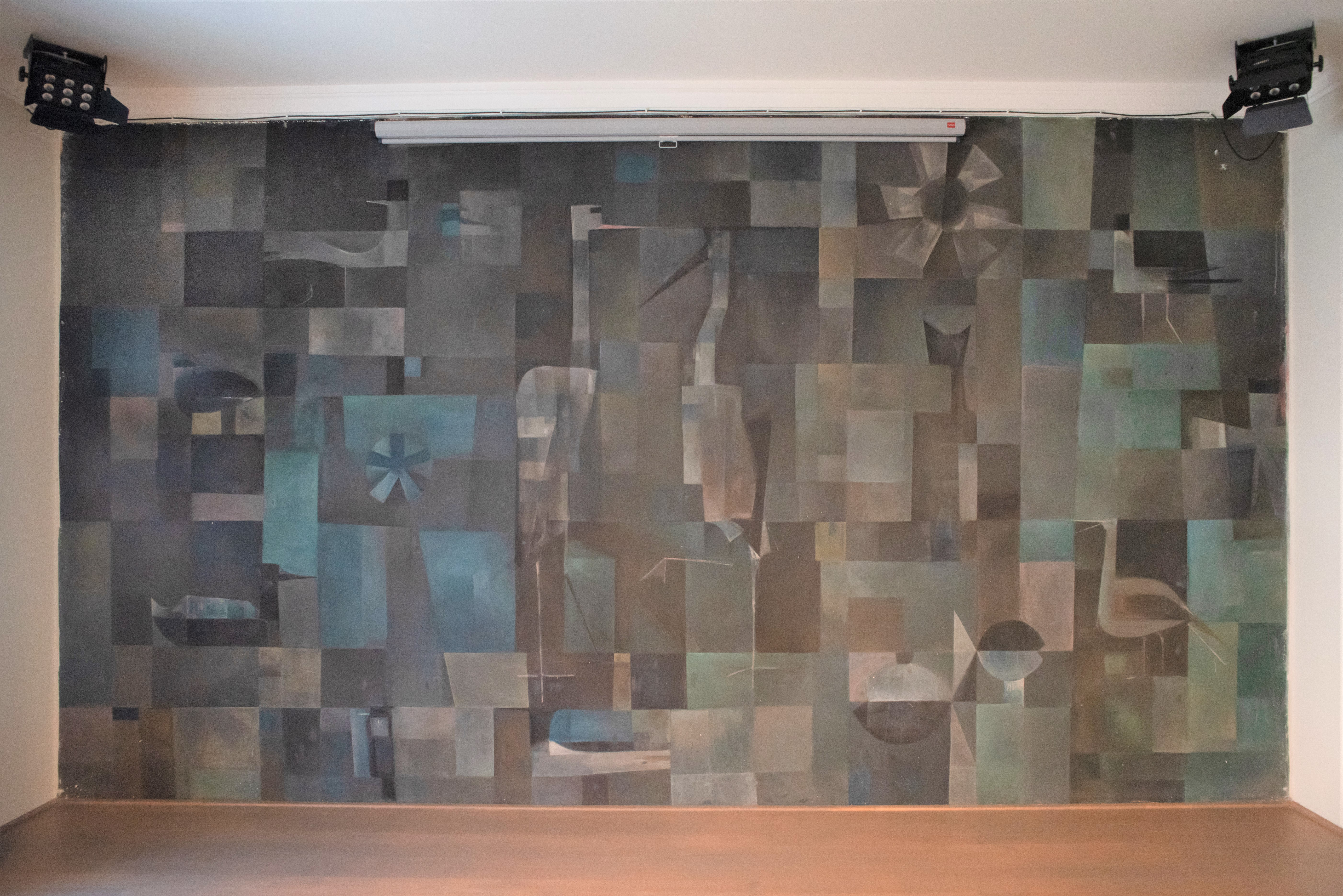 Nástěnná malba Jaroslava Kolihy v Divadle Oskara Nedbala Tábor